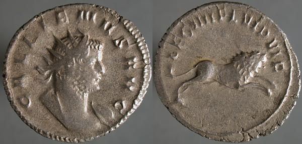 Gallieno, antoniniano di biglione, zecca di Mediolanum Milano GALLIENVS AVG, busto radiato e corazzato a destra LEG IIII FL VI P VI F, leone che corre verso destra Göbl MIR 1002r La moneta fa riferimento alla Legio IIII Flavia Felix